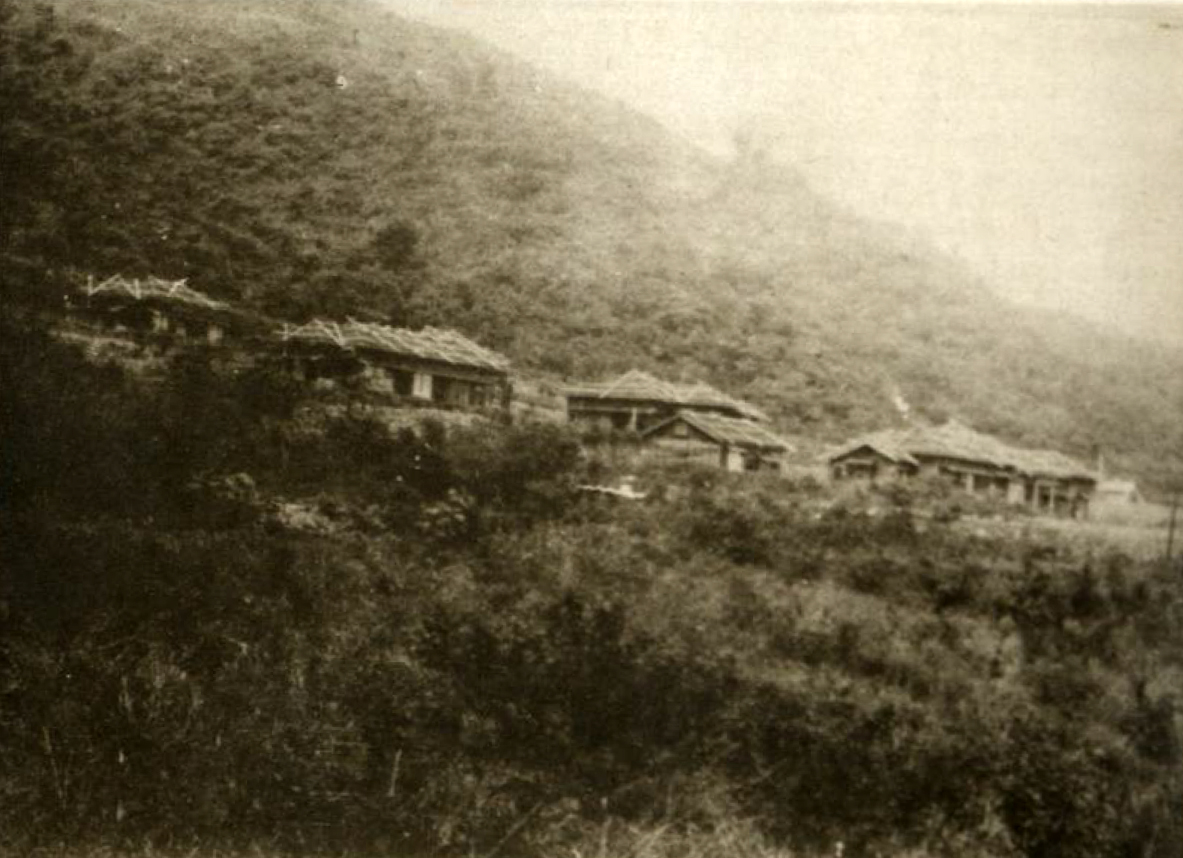 1933年設立的台東藥用植物試驗地，1939年改為林業試驗所マリブル(麻里霧)支所，現為林業試驗所太麻里研究中心